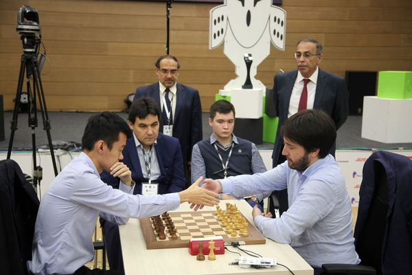 Заключительная партия Кубка мира-2019...